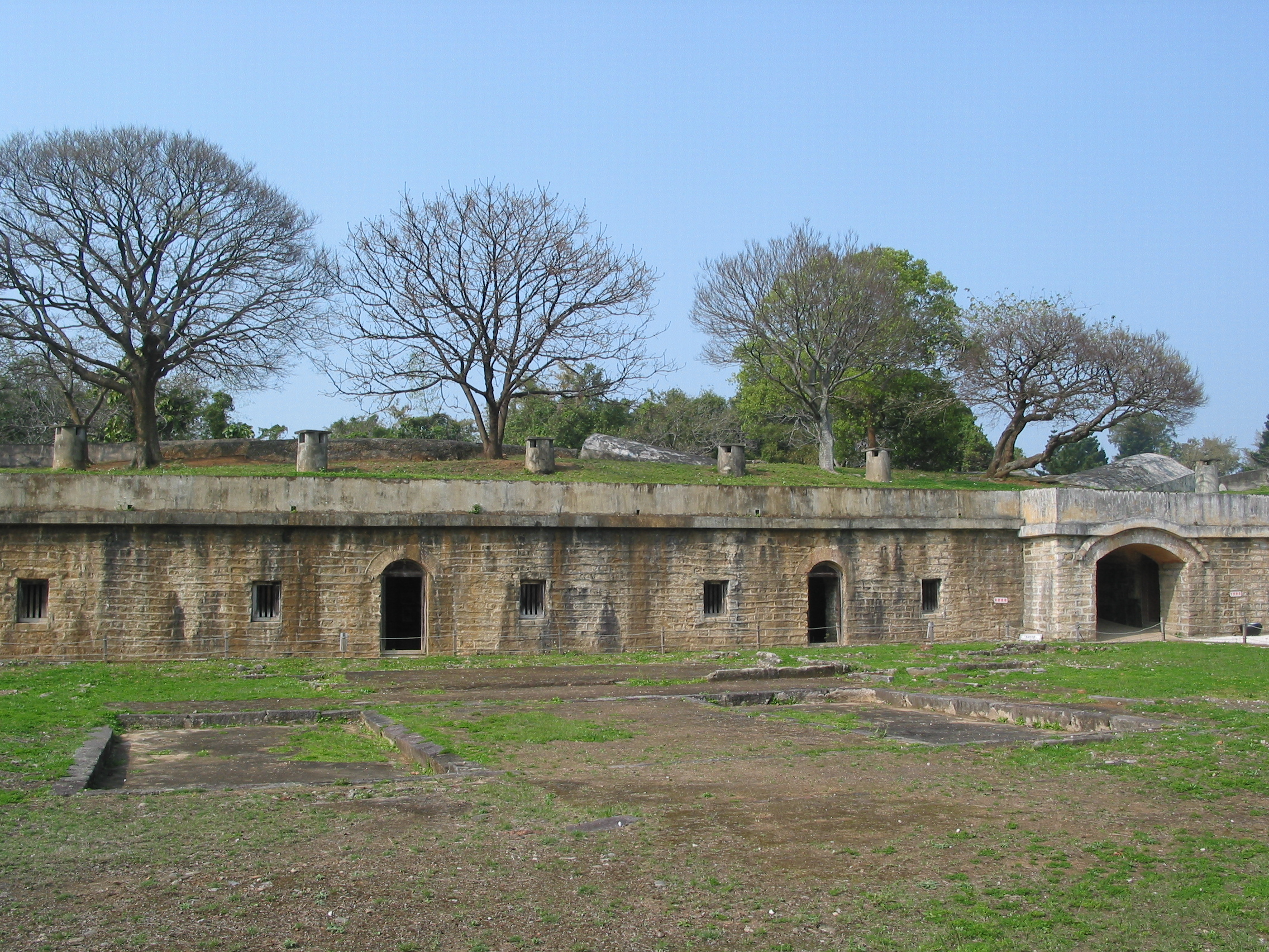 中文（台灣）: 滬尾砲台內埕廣場遺跡。